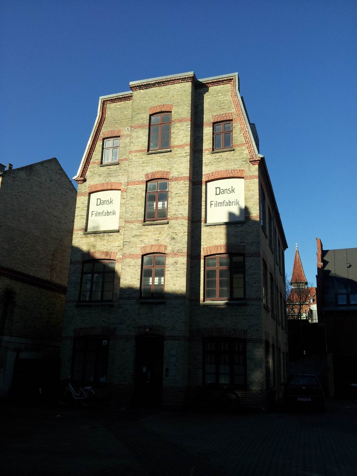 Billede af fabriksbygningen Dansk Filmbarik i baggråden ved Nørre Allé 13 i Århus